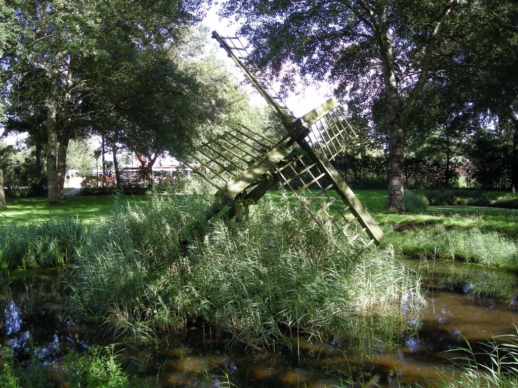 De tjasker (windmolen) in Bolsward